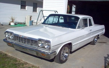 1964 Chevrolet Bel Air